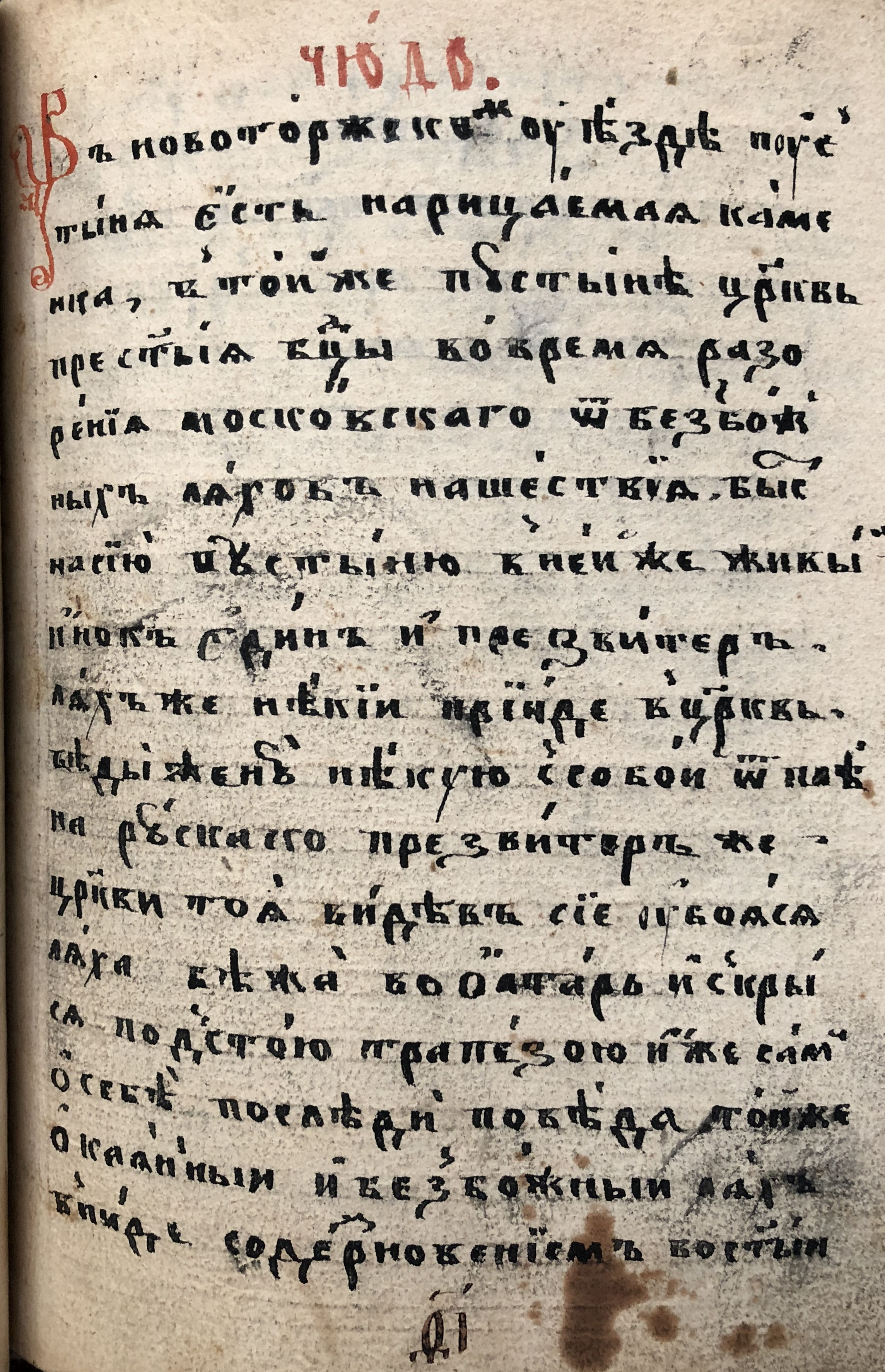 Чудо в веси Каменке Новоторжского уезда. "Звезда Пресветлая" (старообрядческая рукопись, 1840-е гг.; частное собрание)